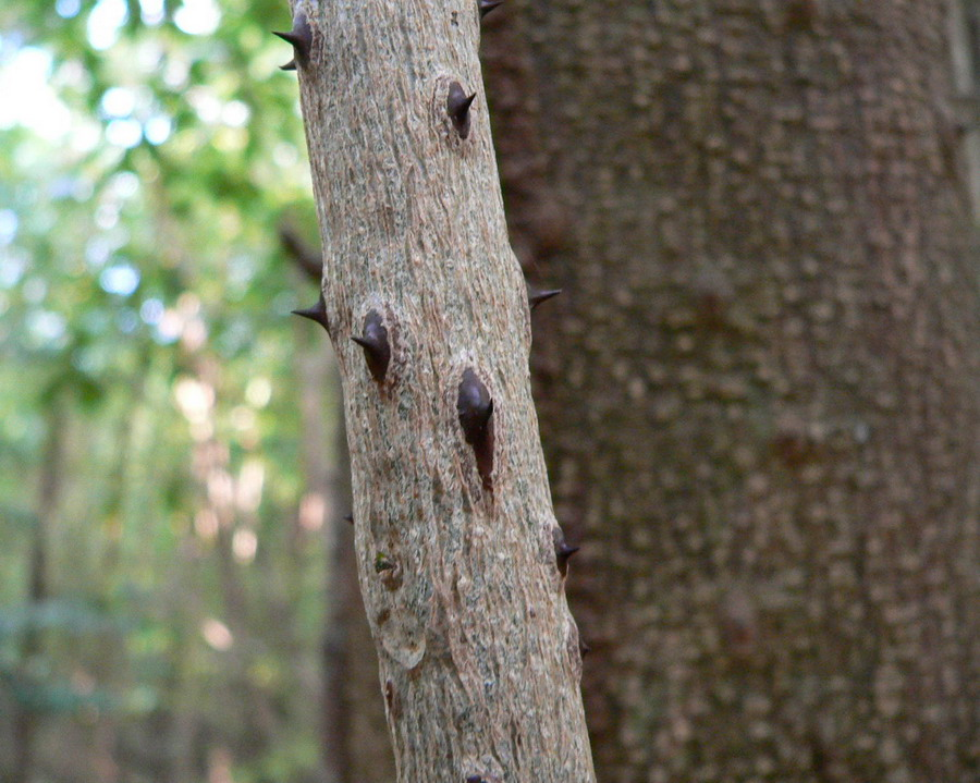 Zanthoxylum caribaeum, tronc épineux